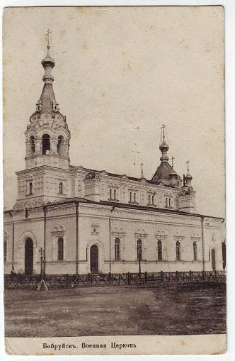 Беларуская (тарашкевіца): Бабруйск (Babrujsk), вуліца Менская (vulica Mienskaja). Гарнізонная царква-мураўёўка